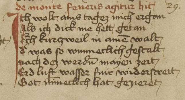 Beginn der mittelalterlichen Minnerede "Das Kloster der Minne".